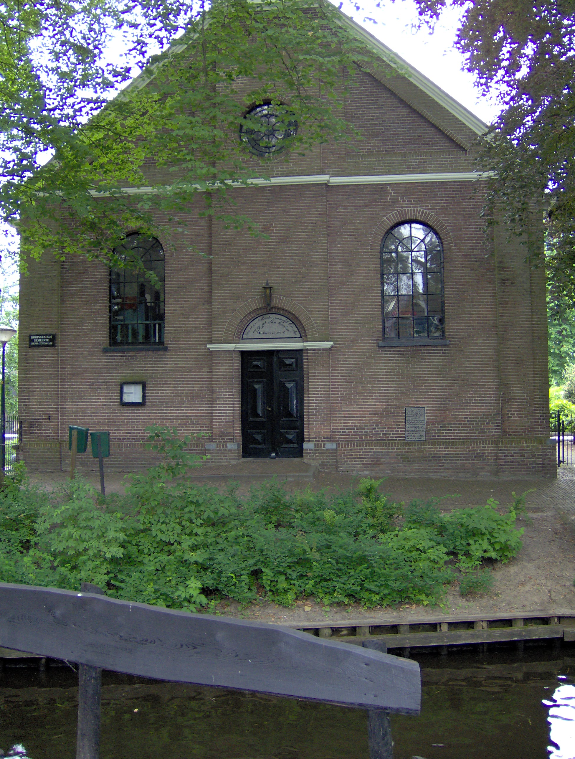 Zelfgemaakte foto, geplaatst onder GFDL